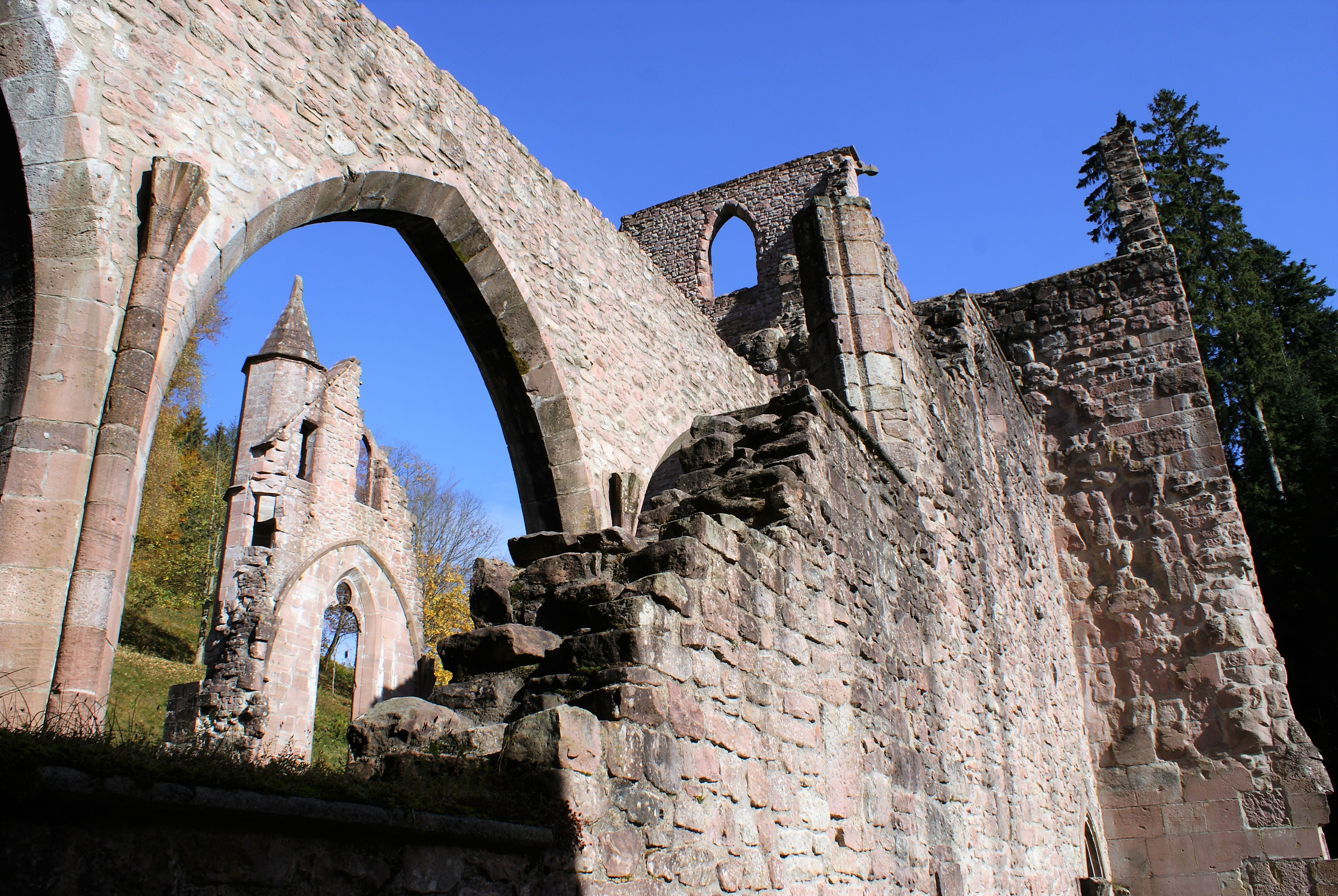 Die Klosterruine des Klosters Allerheiligen 2012